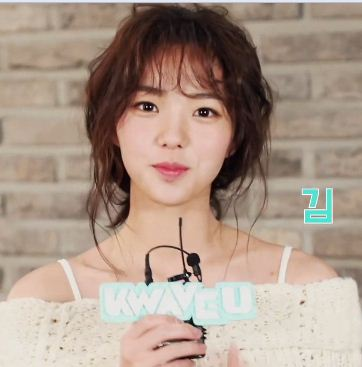 actriz Chae Soo Bin para KWAVE U Fan Wish en mayo de 2017